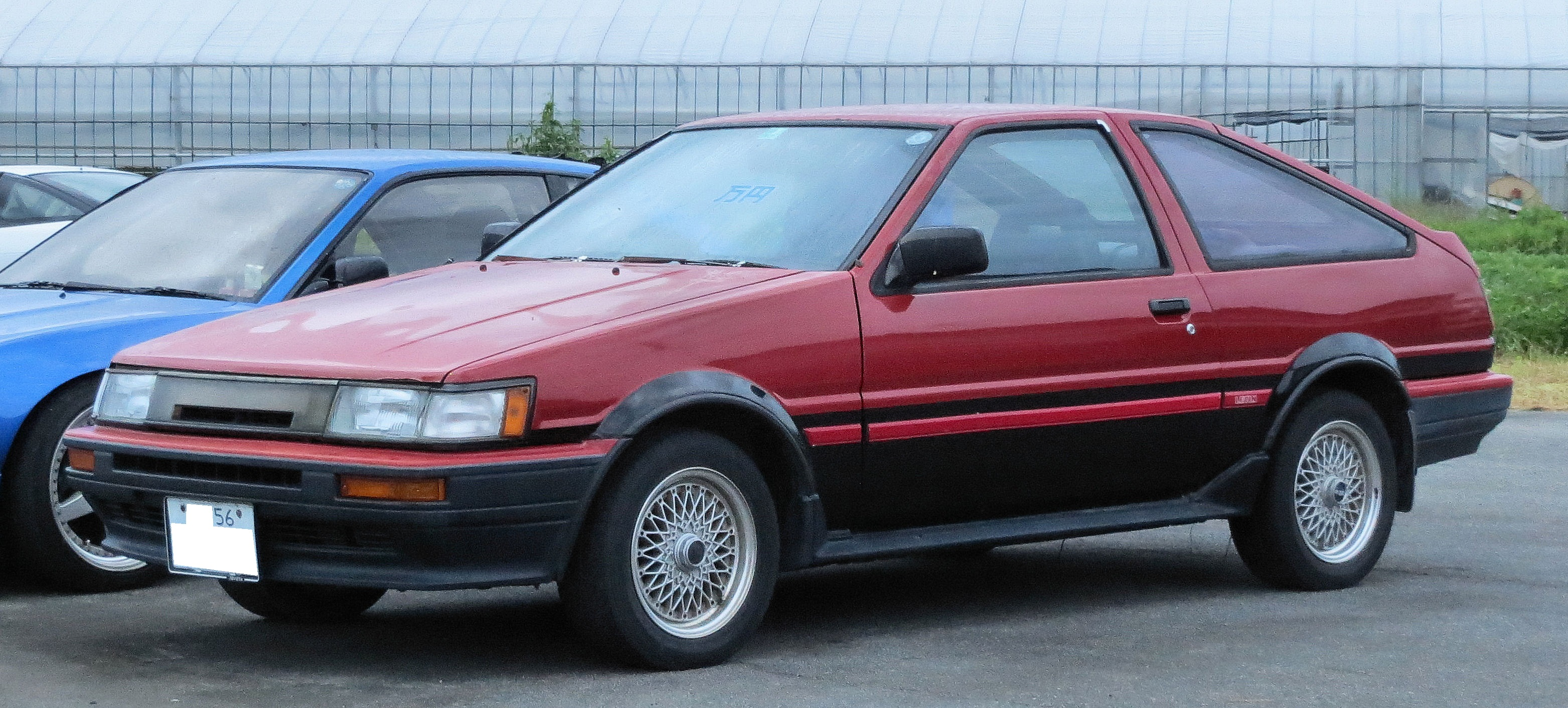 トヨタ カローラレビン ハッチバック 1.6 GTV （フロントグリルとバンパーを後期型に付け替えた前期型）